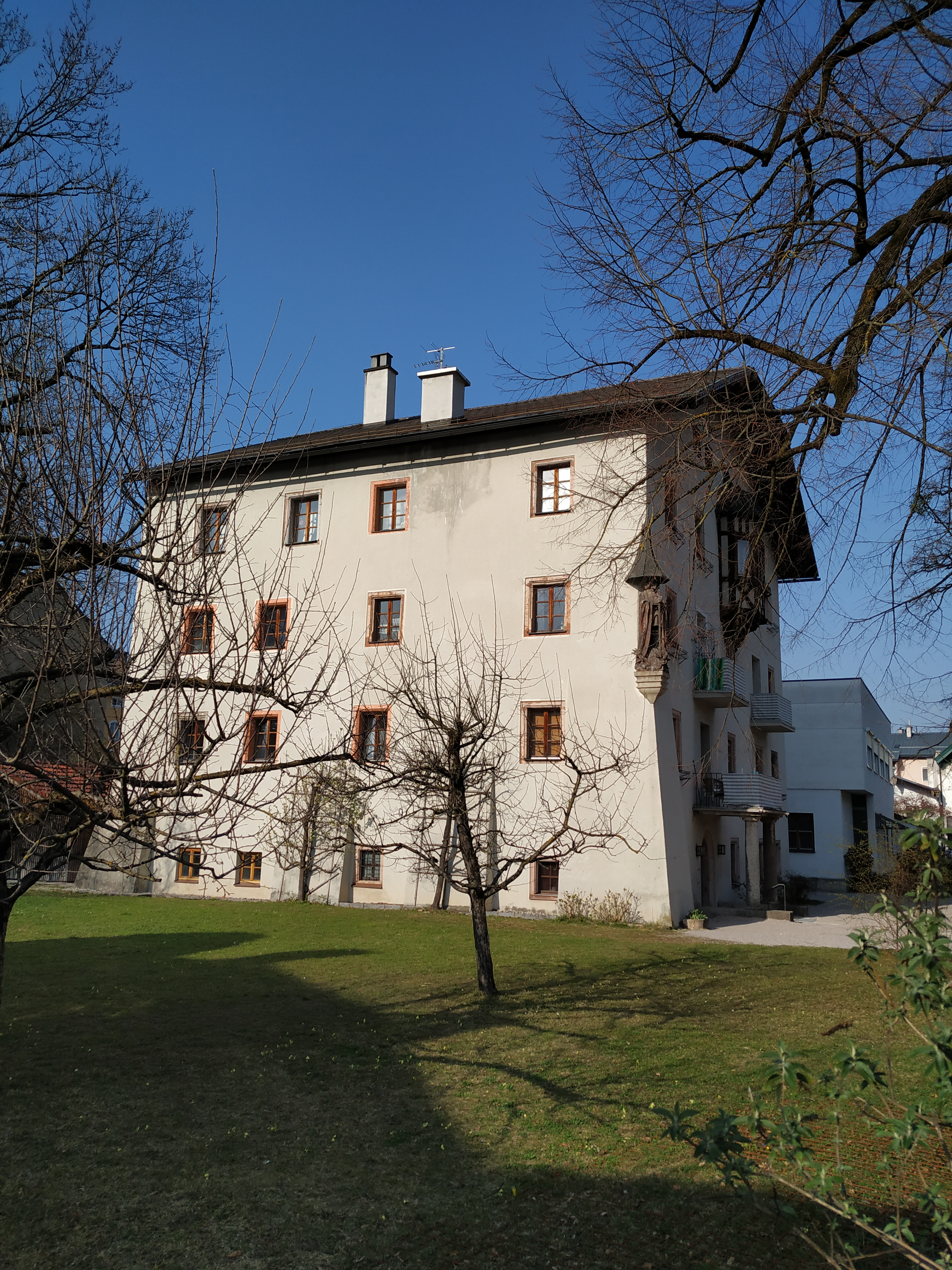 Cordon-Haus, Burgfriedstraße 1, 5400 Hallein